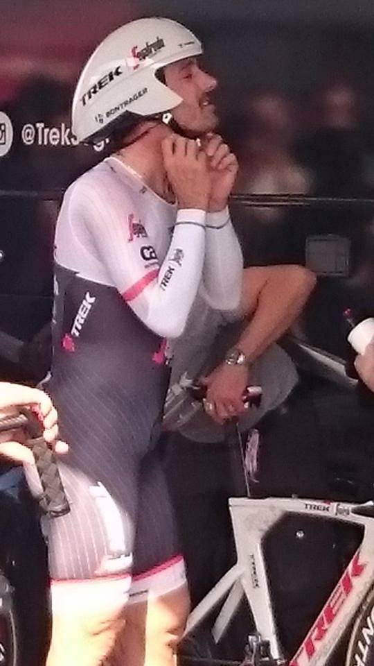 Fabian Cancellara